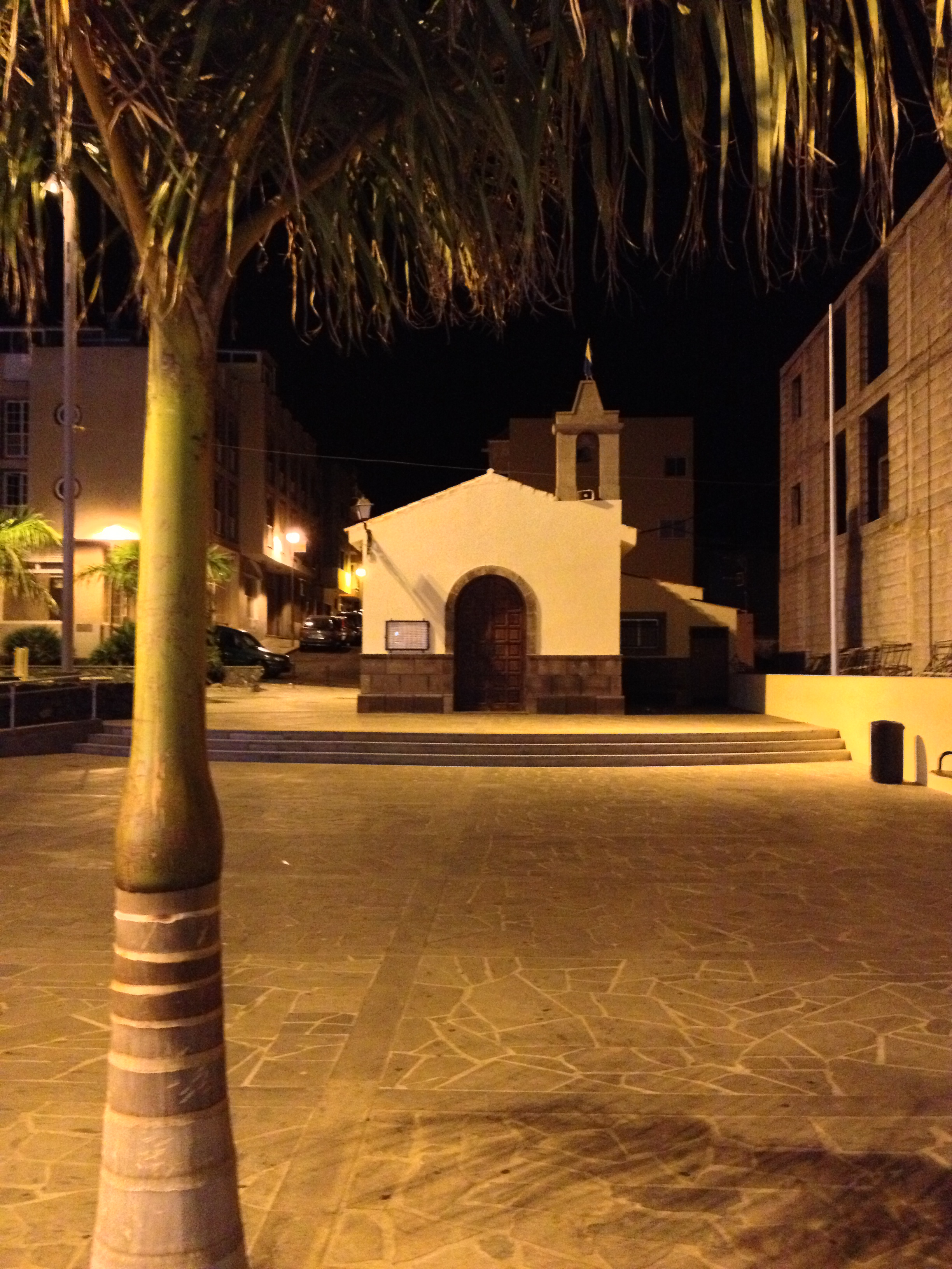 Iglesia de San Blas. (Los Abrigos)